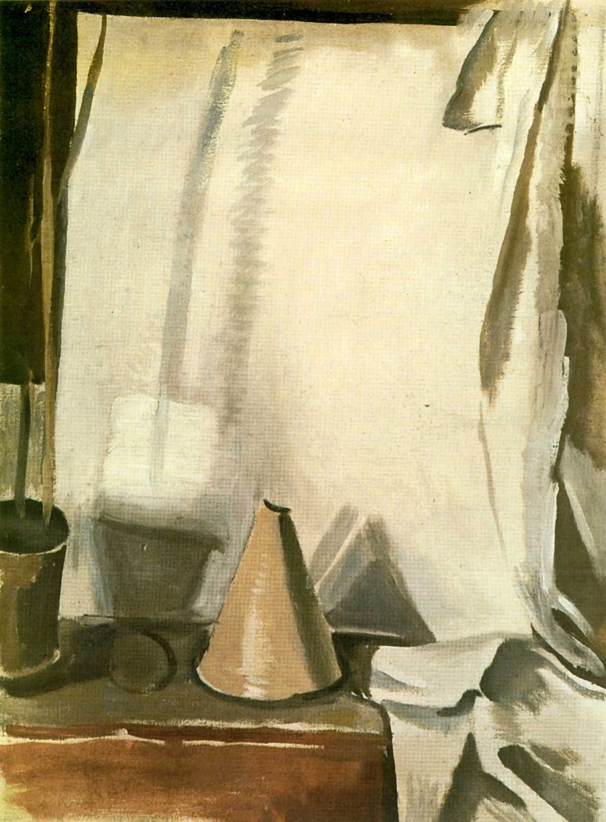 А. Е. Карев. Конус на белом фоне. 1921. Х., м., 45х58 см